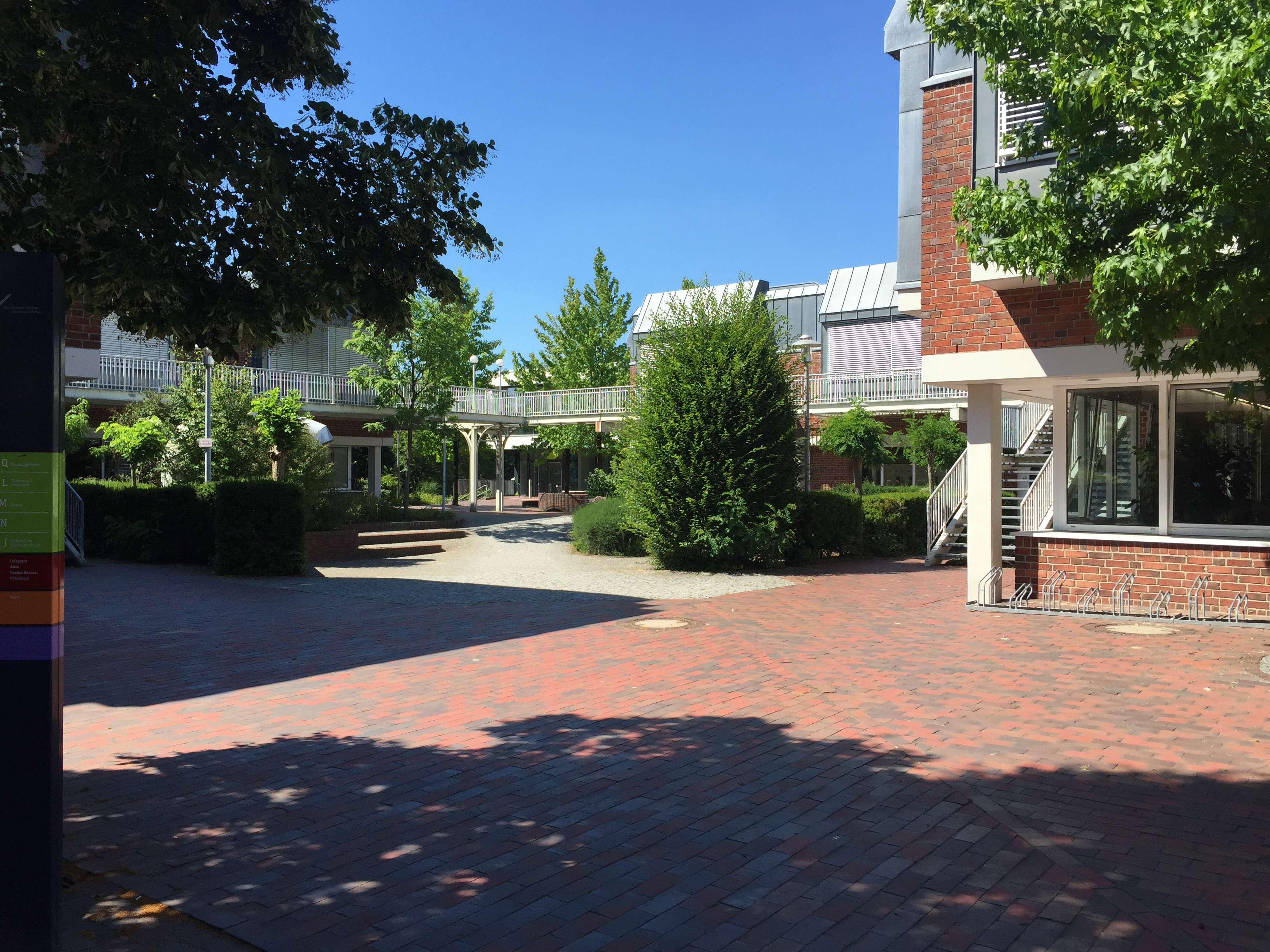 Der Zentralcampus der Universität Vechta.